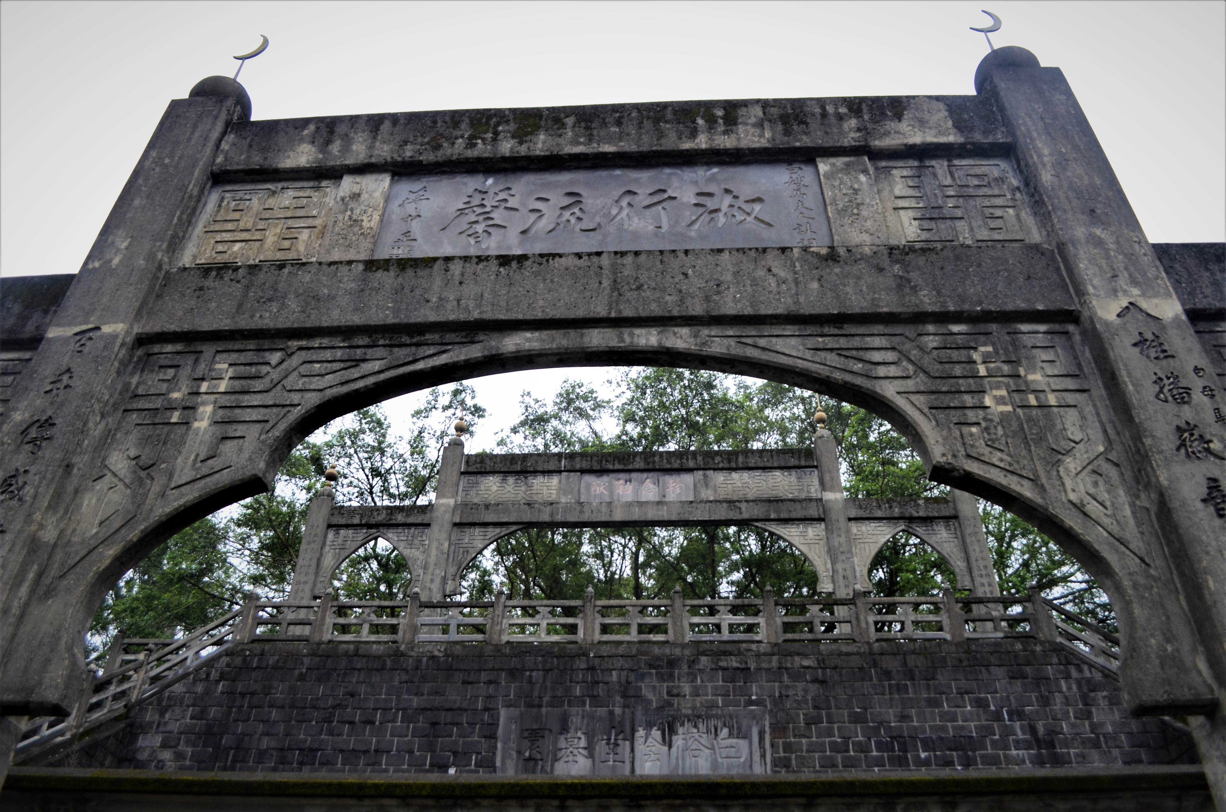 中文（台灣）: 白榕蔭堂墓園(白崇禧將軍墓)民國52年，白夫人馬佩璋女士過世，白崇禧將軍於回教公墓內闢建｢白榕蔭堂墓園｣，為白將軍留學美國學建築之兒子所設計、大陸工程公司興建，殆民國55年白崇禧將軍過世後亦安葬於此。